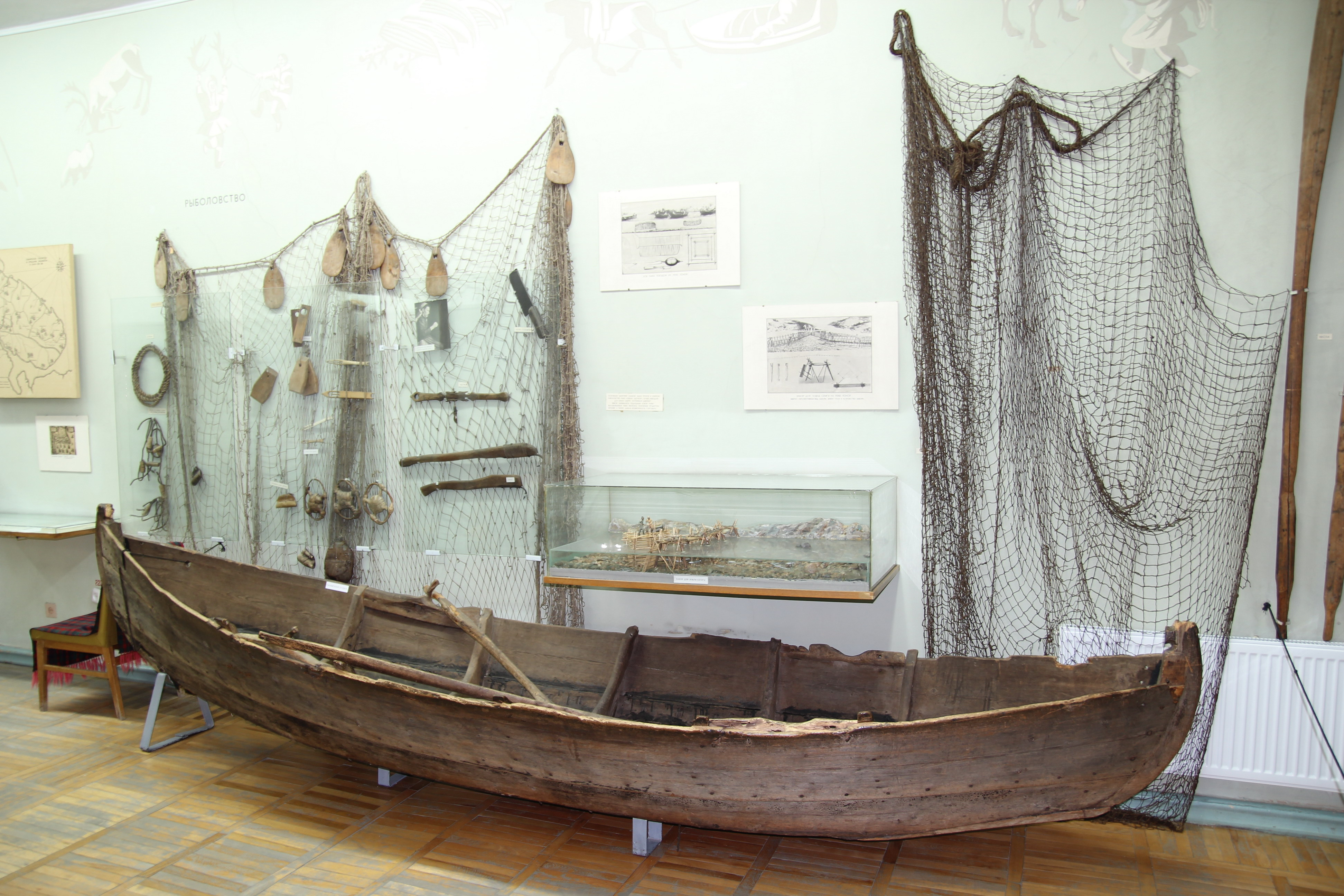 Саамская лодка в Краеведческом музее Мурманска